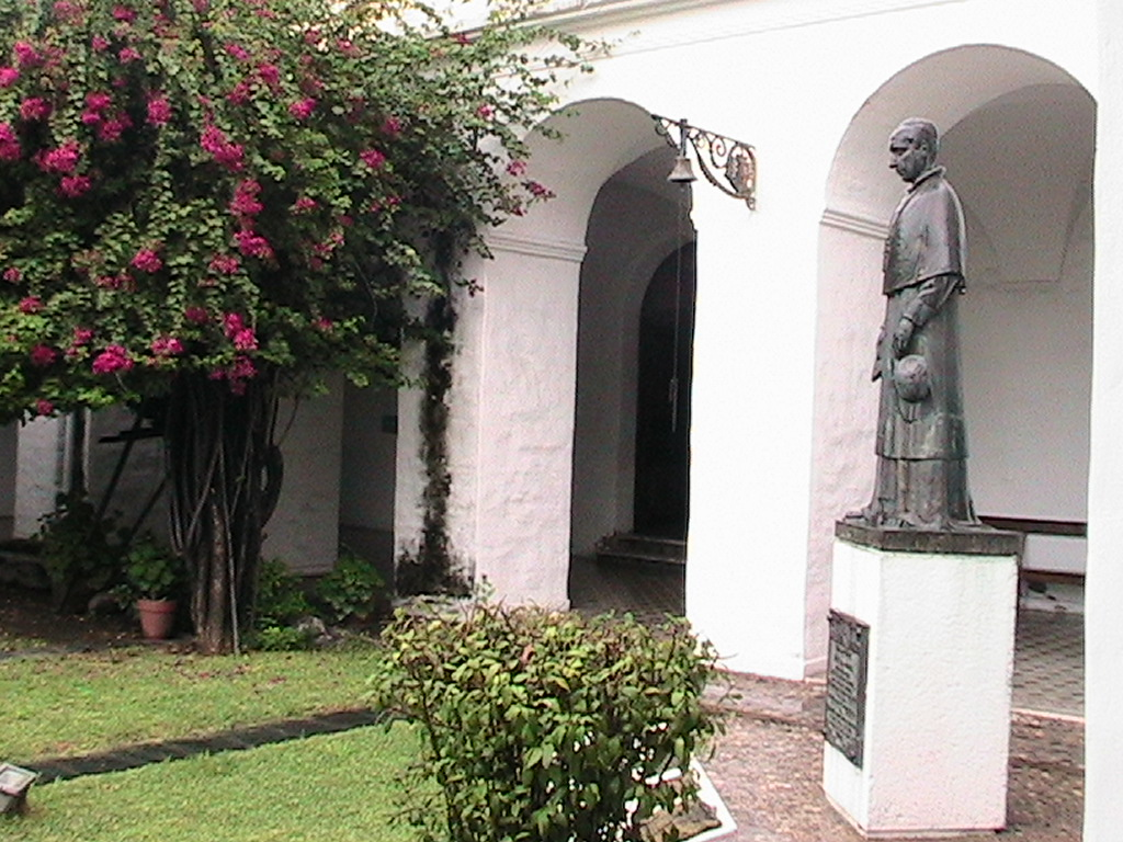 Patio del Fundador